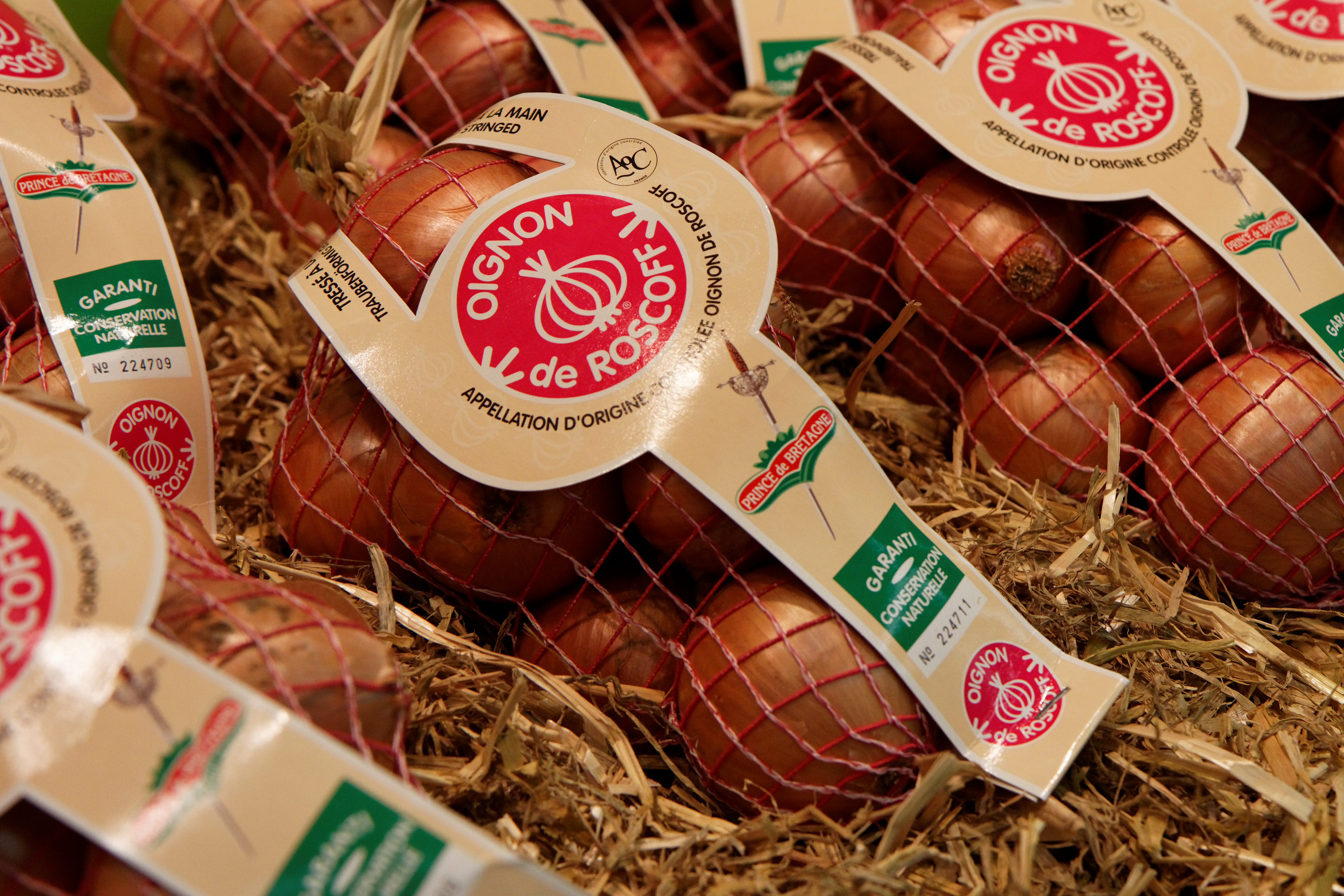 Le salon de l'agriculture de Paris en 2011.